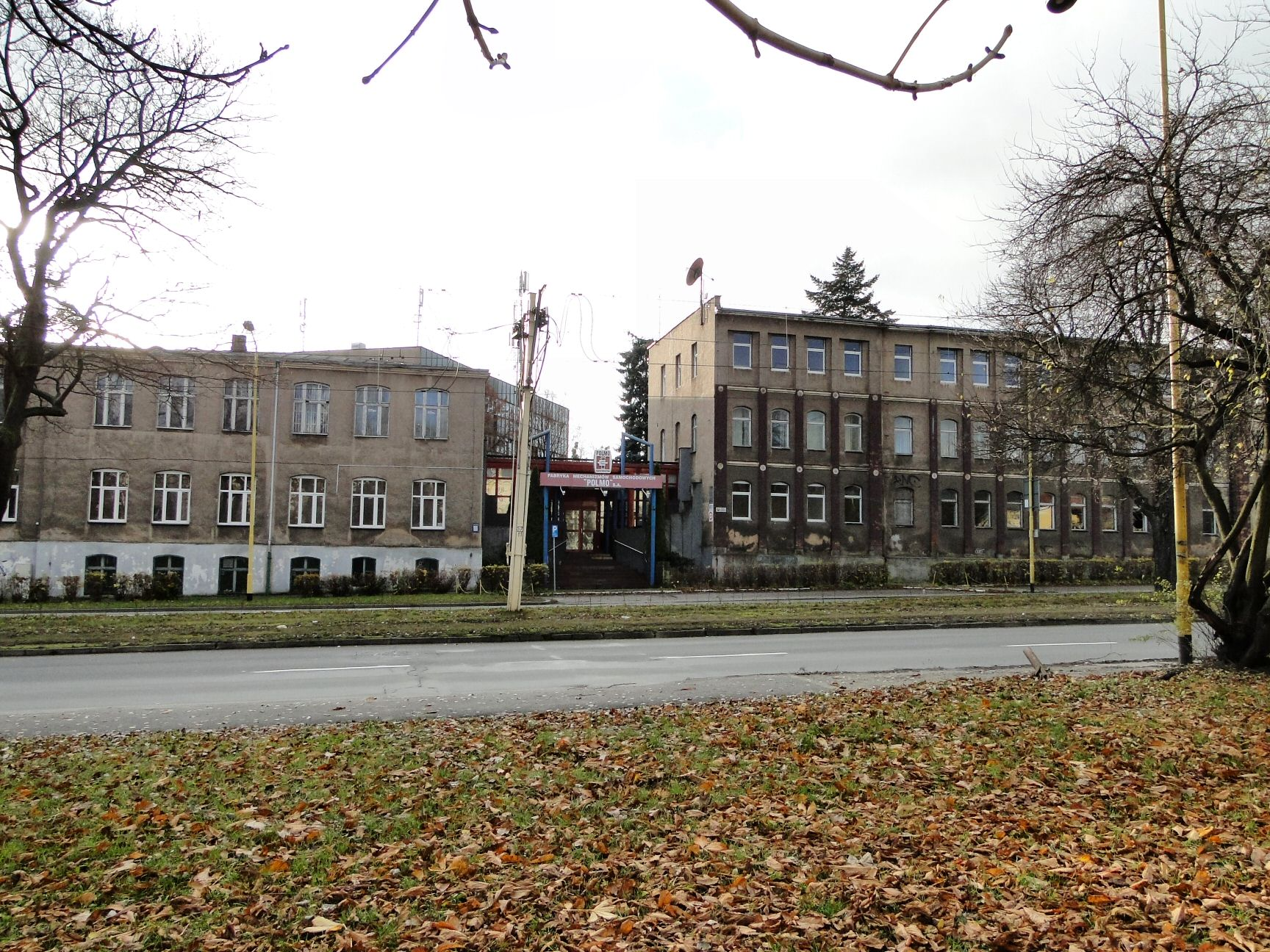 Wejście główne do FMS "Polmo" przy al. Wojska Polskiego w Szczecinie